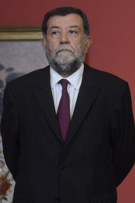 Presidenta Bachelet junto a Ministros Álvaro Elizalde, Jorge Burgos y Subsecretario Mahmud Aleuy